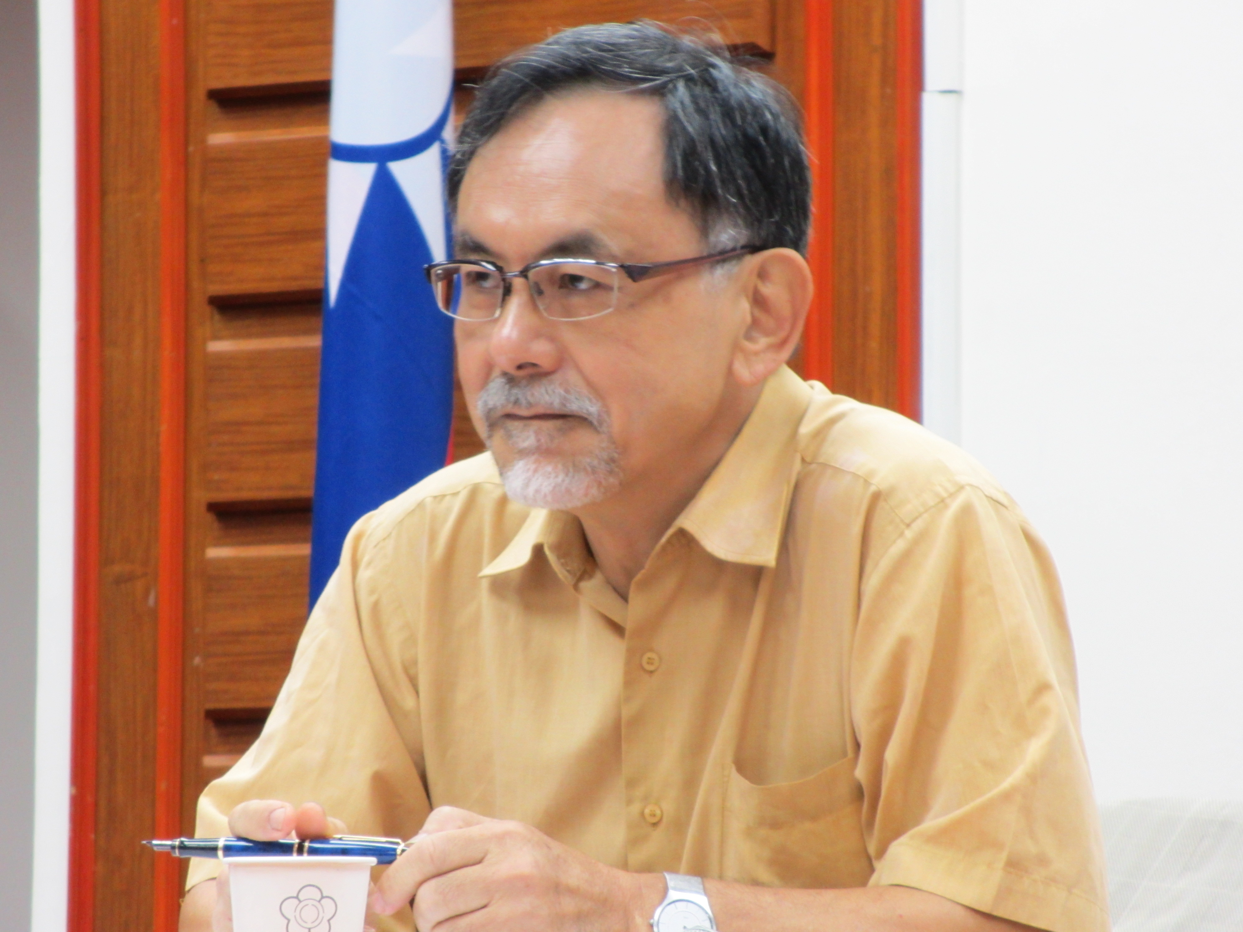 中文（台灣）: 台灣新社會智庫顧問林濁水